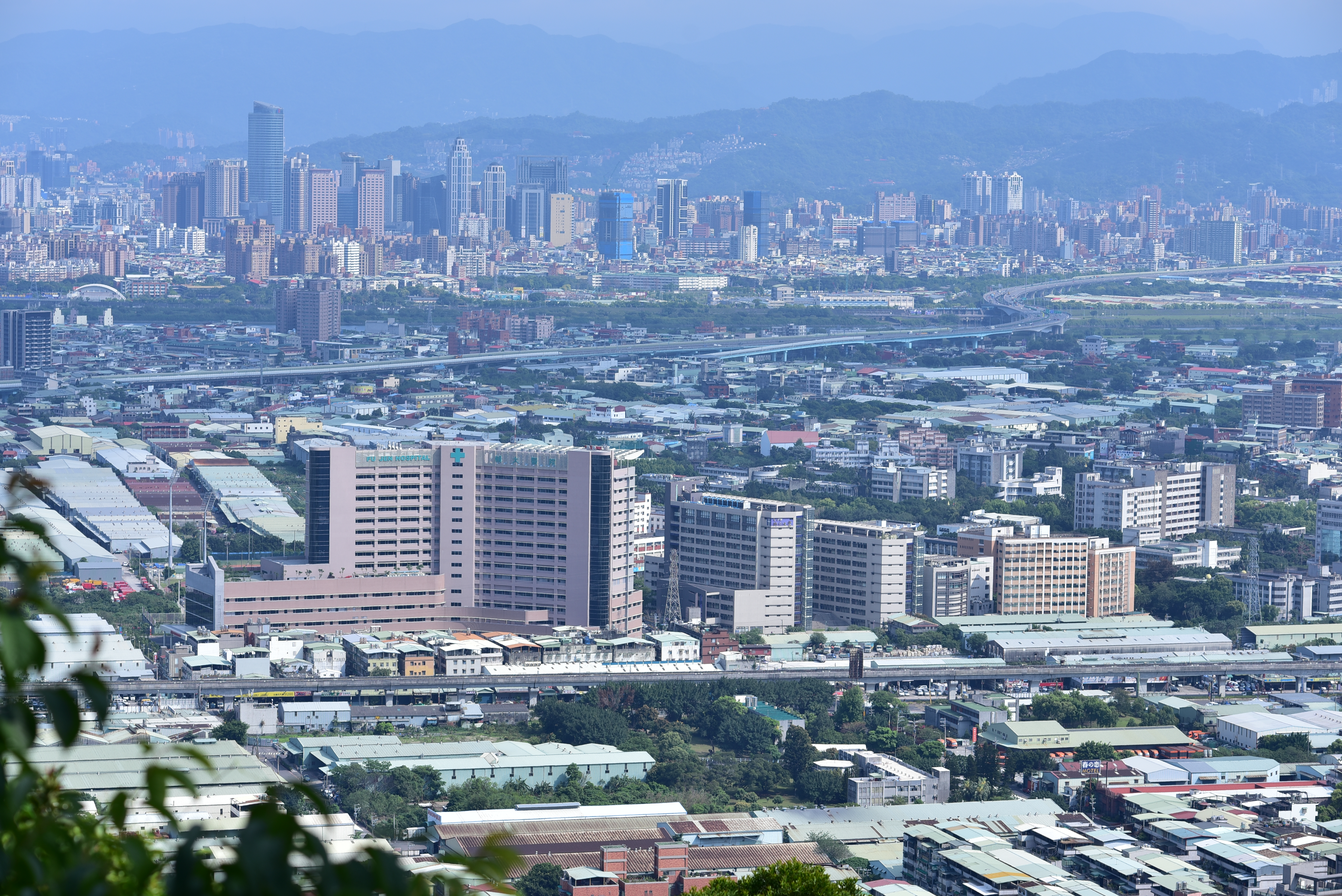 俯瞰輔大醫院